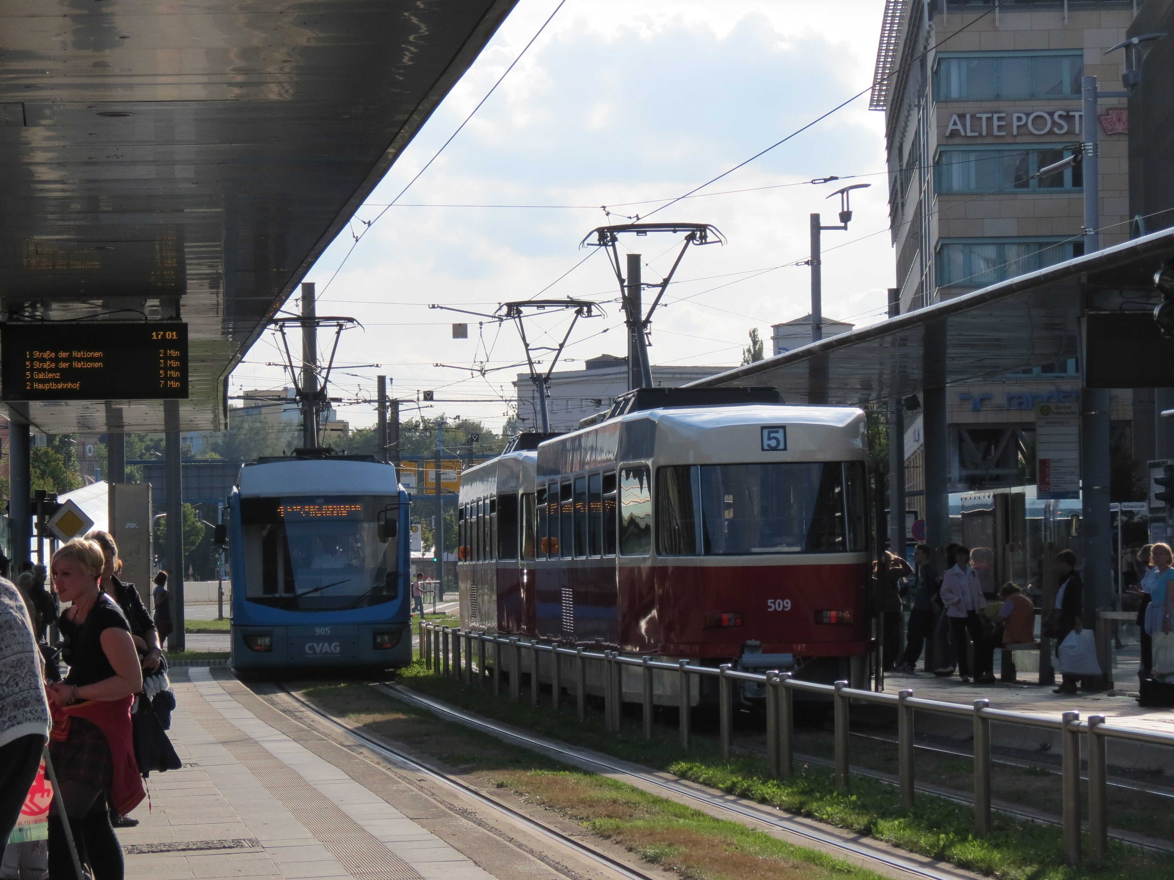 Zentralhaltestelle im Sommer 2012 während der Modernisierung der dynamischen Anzeigen